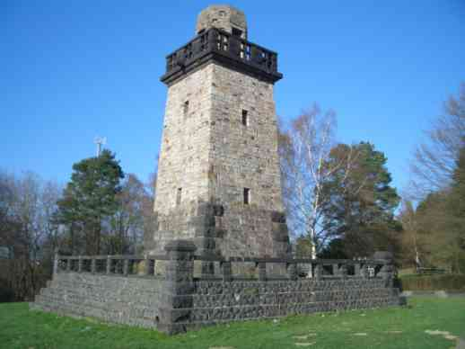 Bismarckturm Altenkirchen (Westerwald)